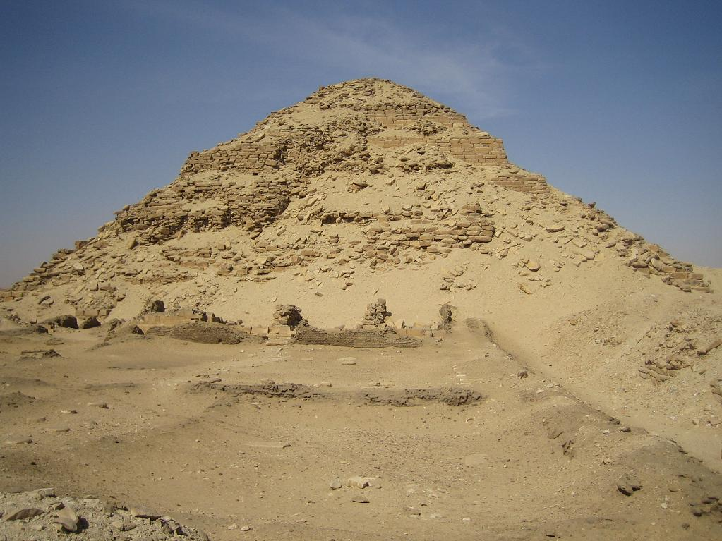 Pyramide des Neferirkare Kakai (Westseite)